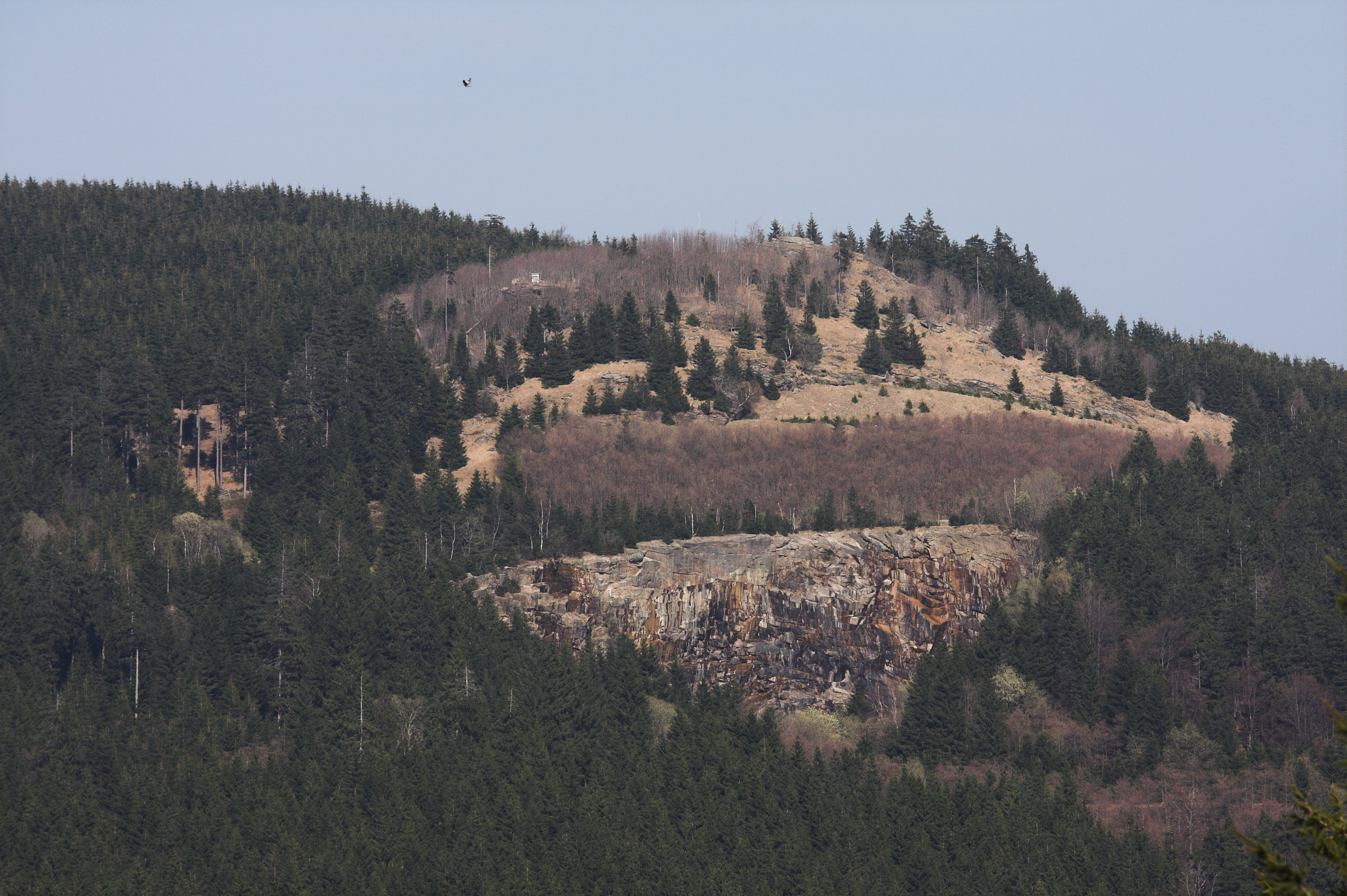 Der Wurmbergsteinbruch und die Großen Wurmbergklippen aufgenommen von der B4 nahe dem Jermerstein.